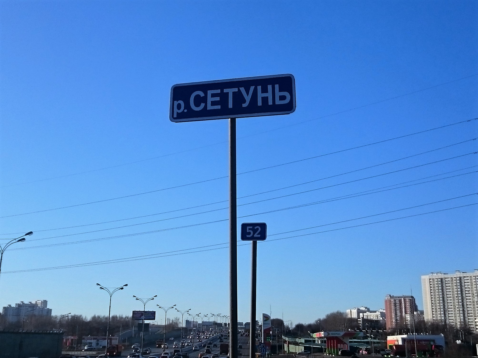 Setun, 52km of the MKAD